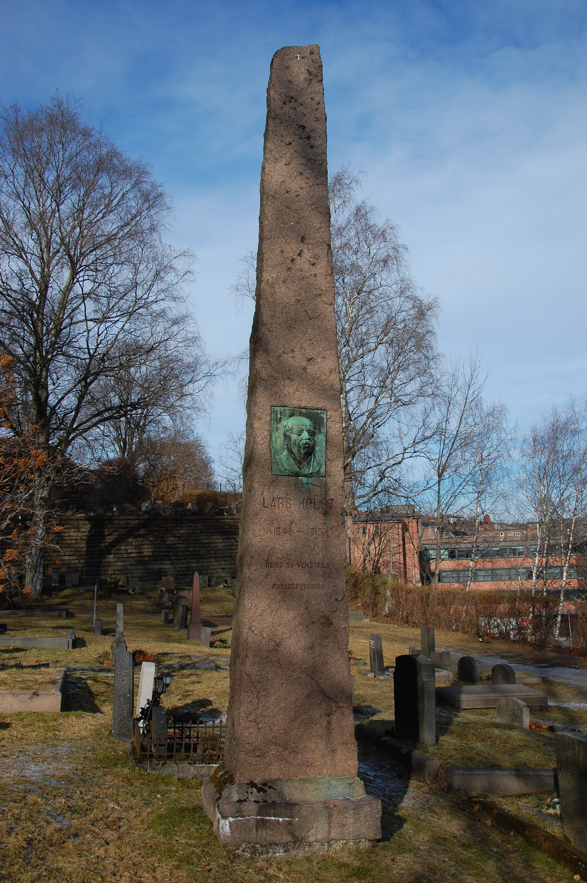 Lars Holst, gravminne på Gamle Aker kirkegård, Oslo